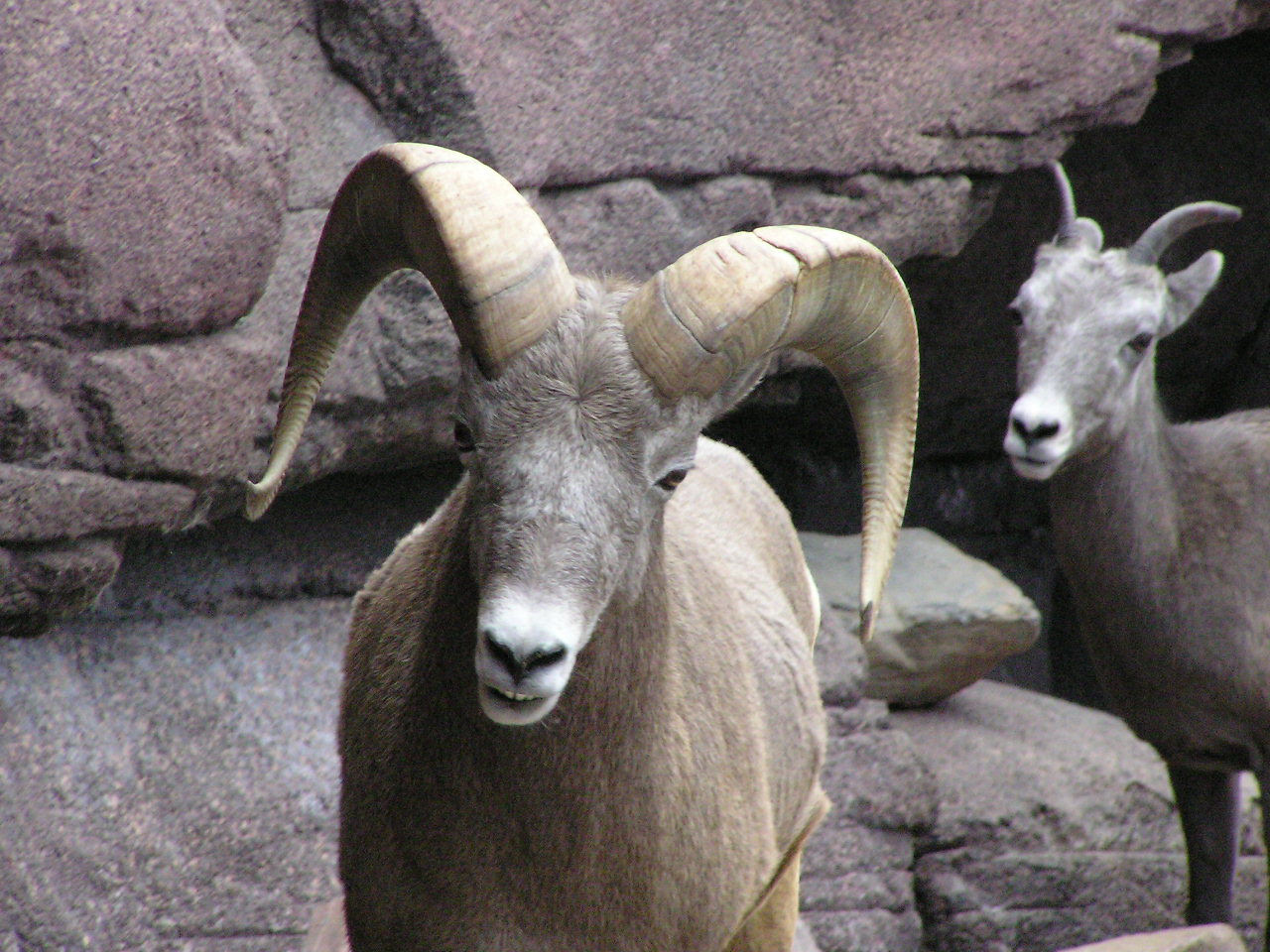 Goats in Apenheul Zoo, Netherlands